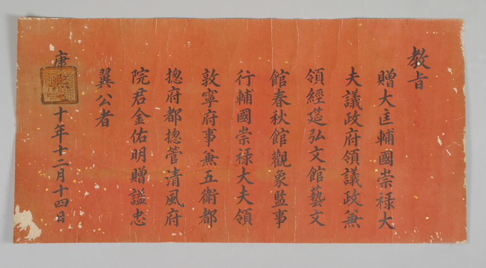 김우명 추증 교지